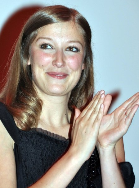 Alexandra Maria Lara à l'avant-première du film L'affaire farewell